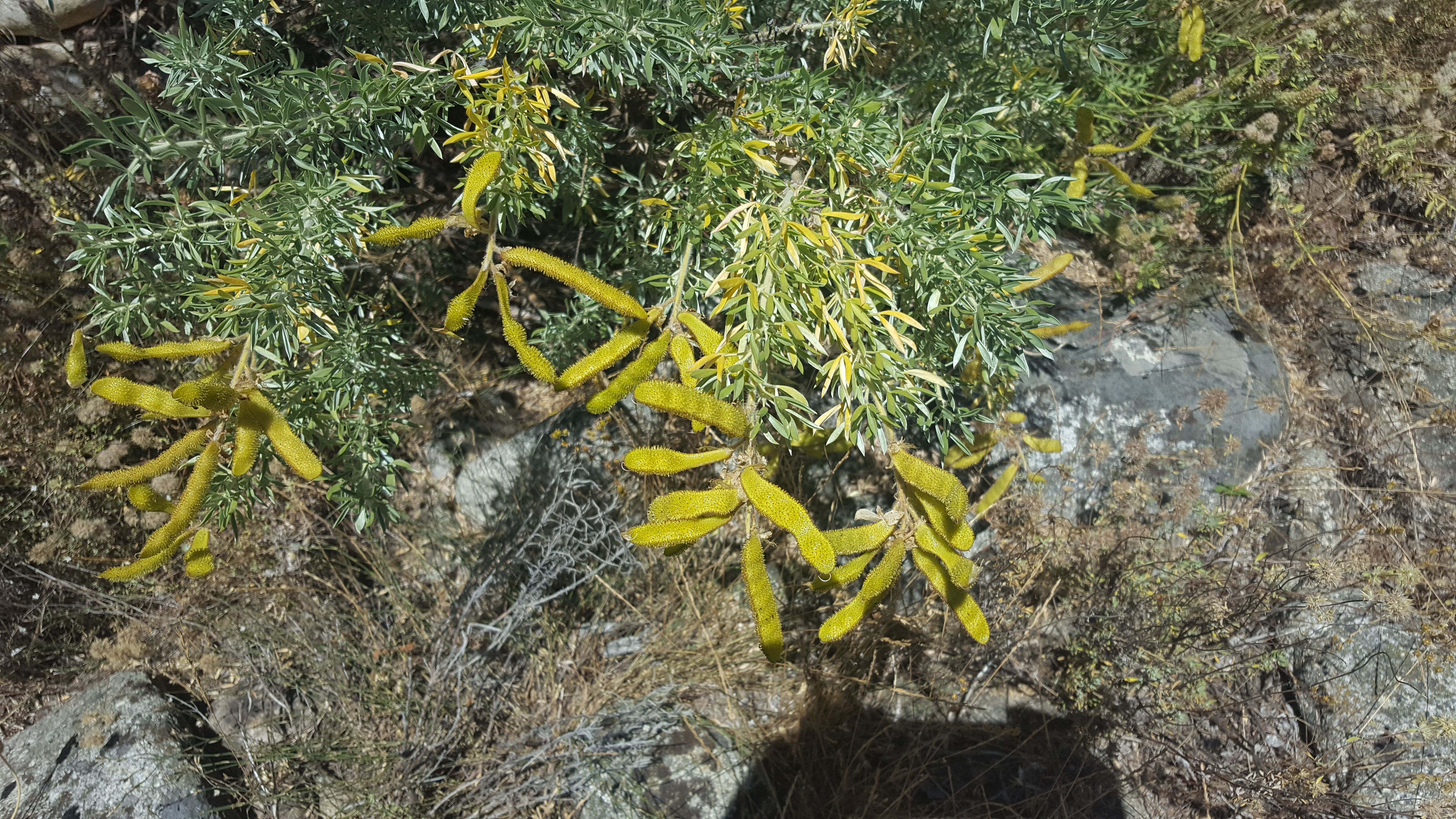 Adenocarpus hispanicus junto al Tormes en Barco de Ávila , España